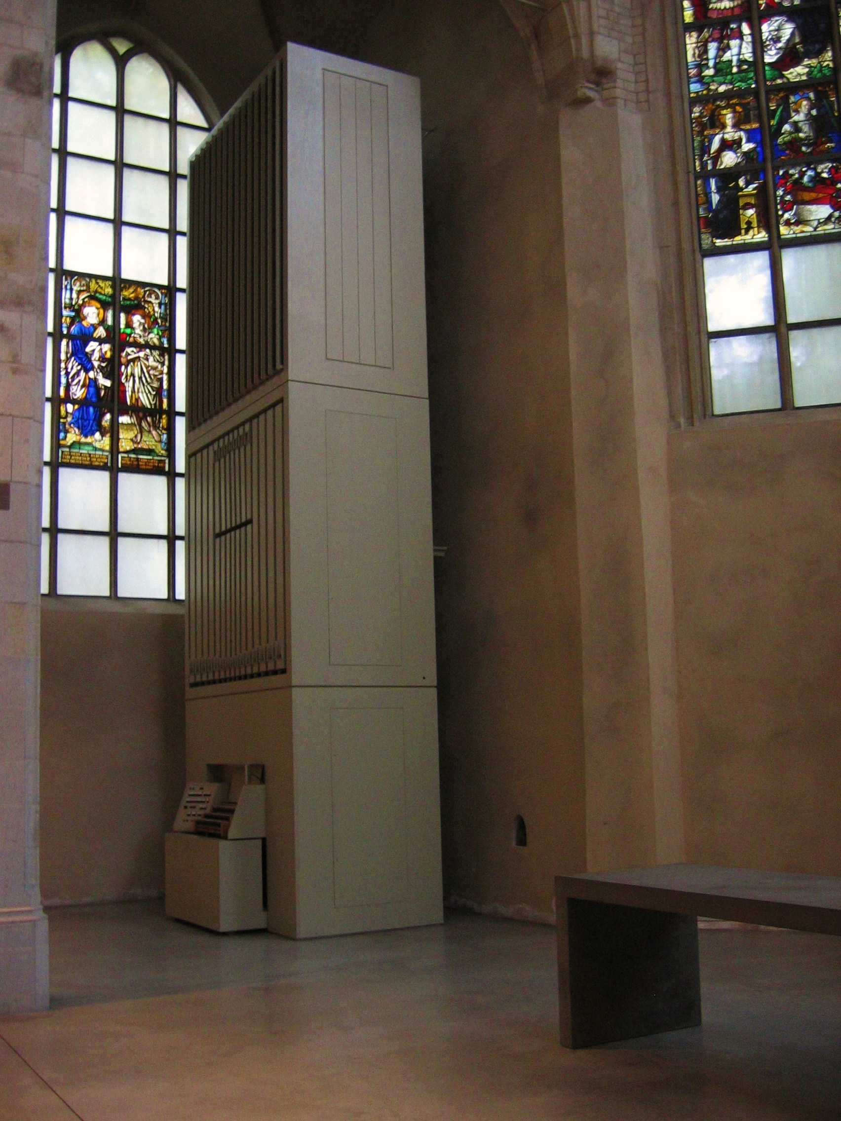 Chororgel der Jesuitenkirche St. Peter in Köln